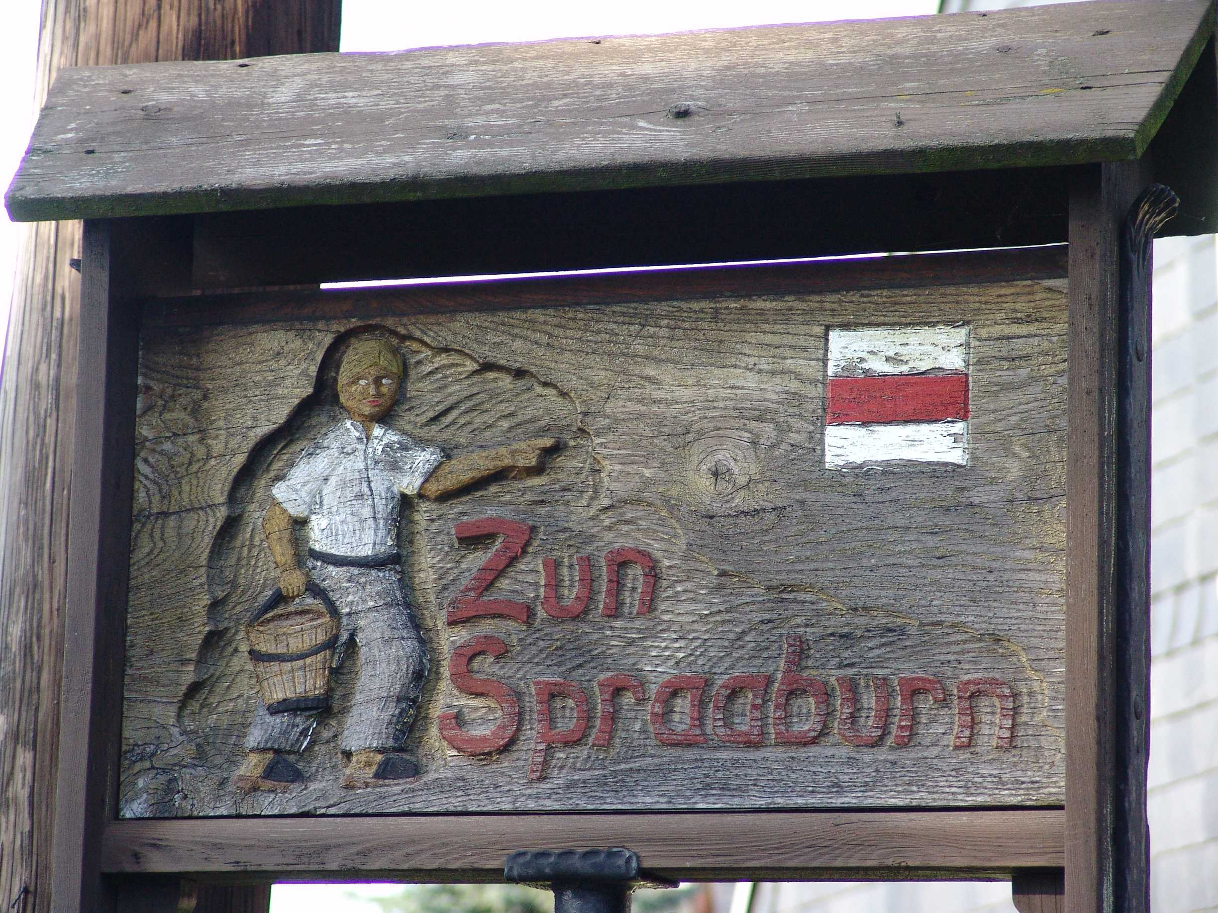 Hinweisschild zur Spreequelle in Ebersbach/Sa., Landkreis Görlitz, Sachsen